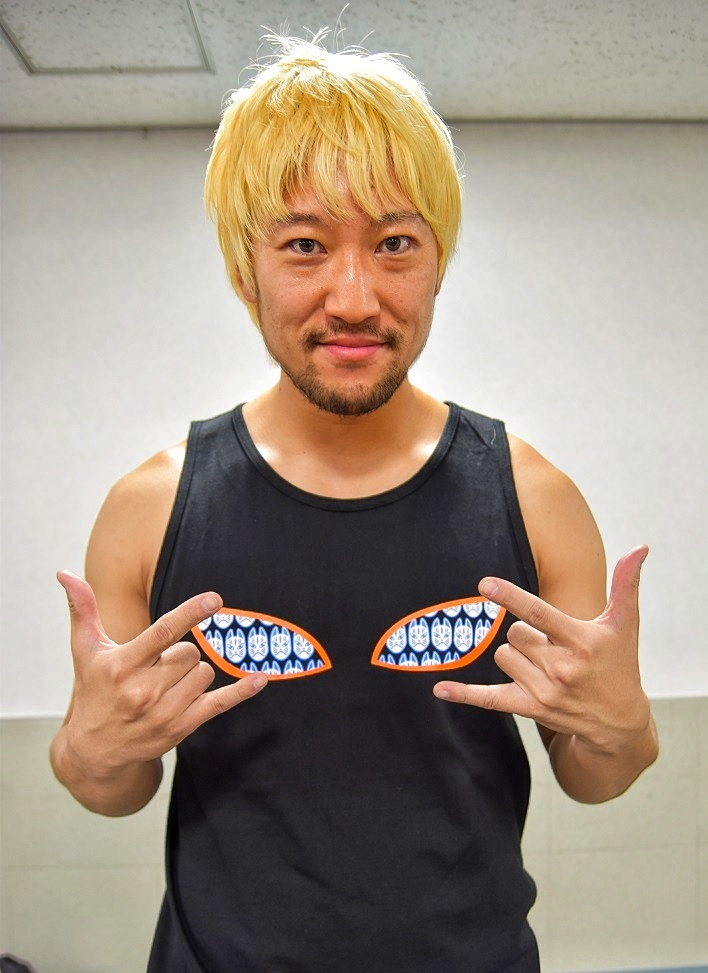 プロレスラーのUTAMARO